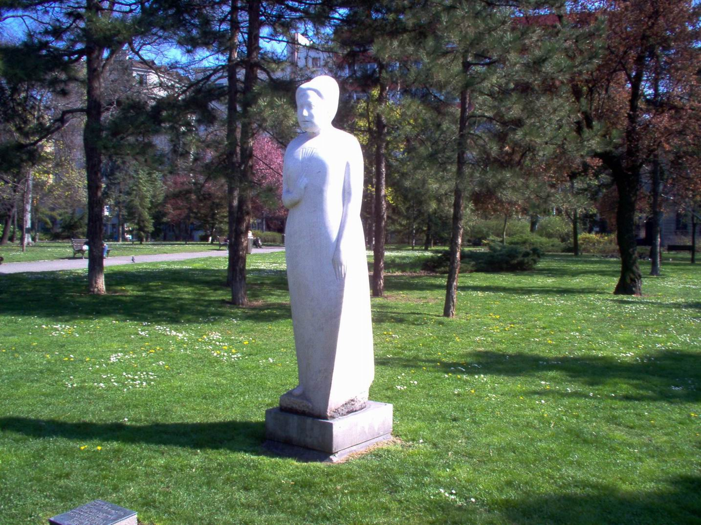 Споменик Надежди Петровић у Пионирском парку, Београд, аутор споменика Ангелина Гаталица 1989.